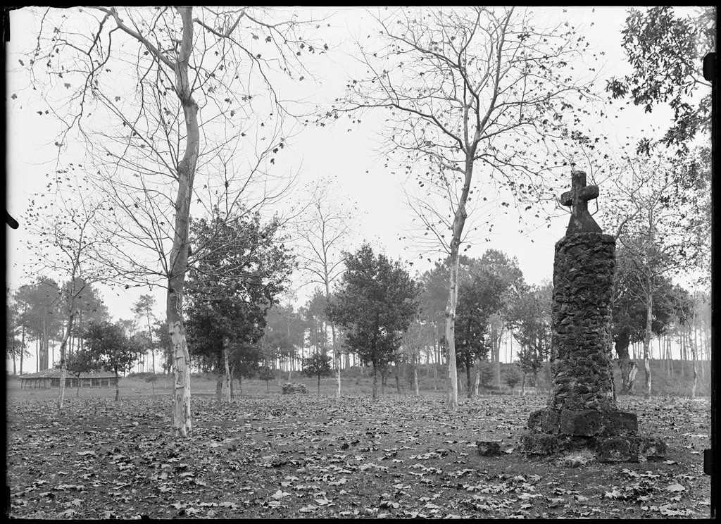 Reproduction numérique de l'œuvre Pyramide près de Ipourt, réalisée par Félix Arnaudin à Lüe le 02 décembre 1913 selon la technique du gélatino bromure d'argent sur plaque de verre (13 x 18 cm)